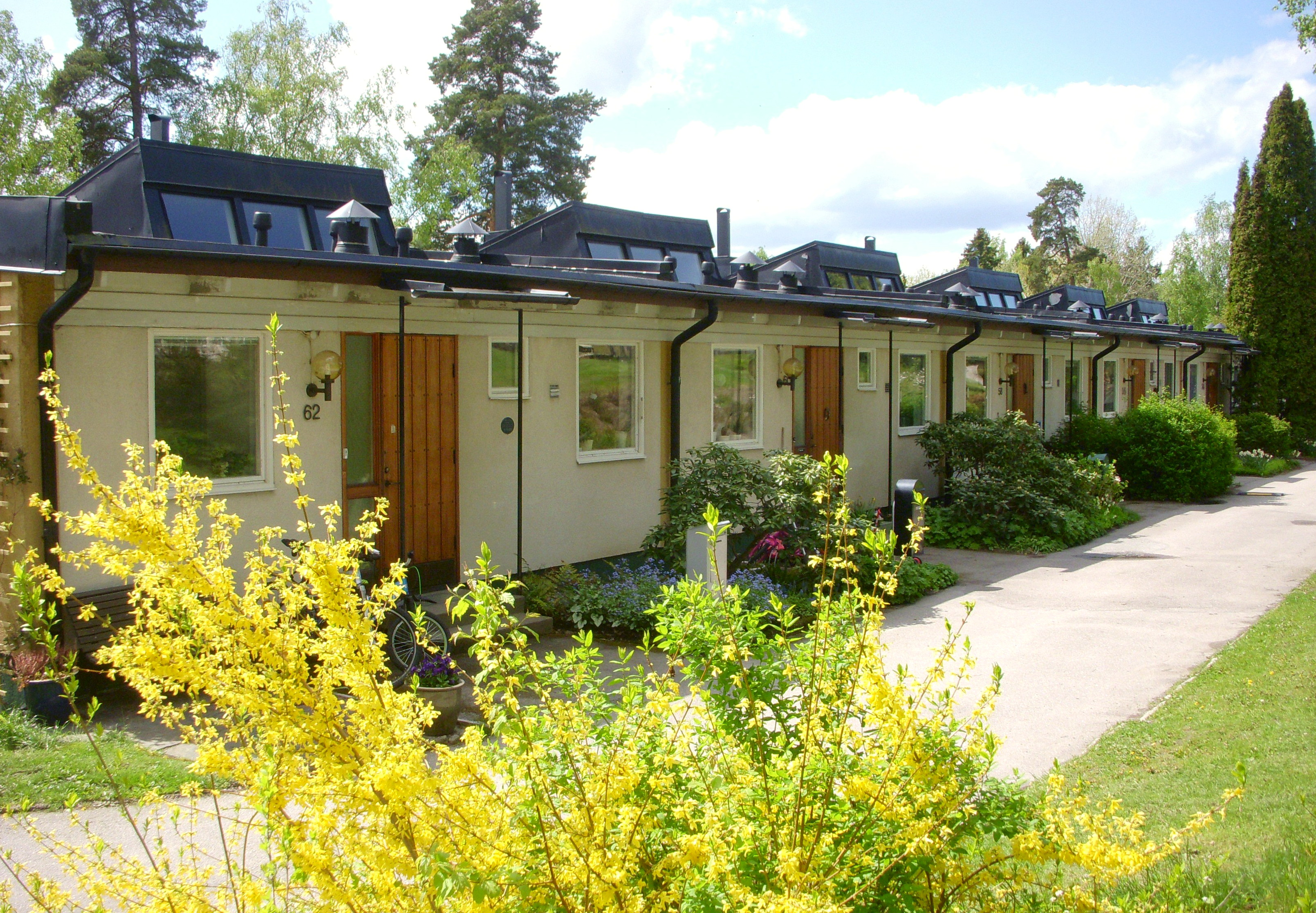 Radhusområde Fresia 5, Måbärsstigen, i Hässelby strand (kallad "Radiohusen") arkitekter Bertil Karlén och Josef Stäck